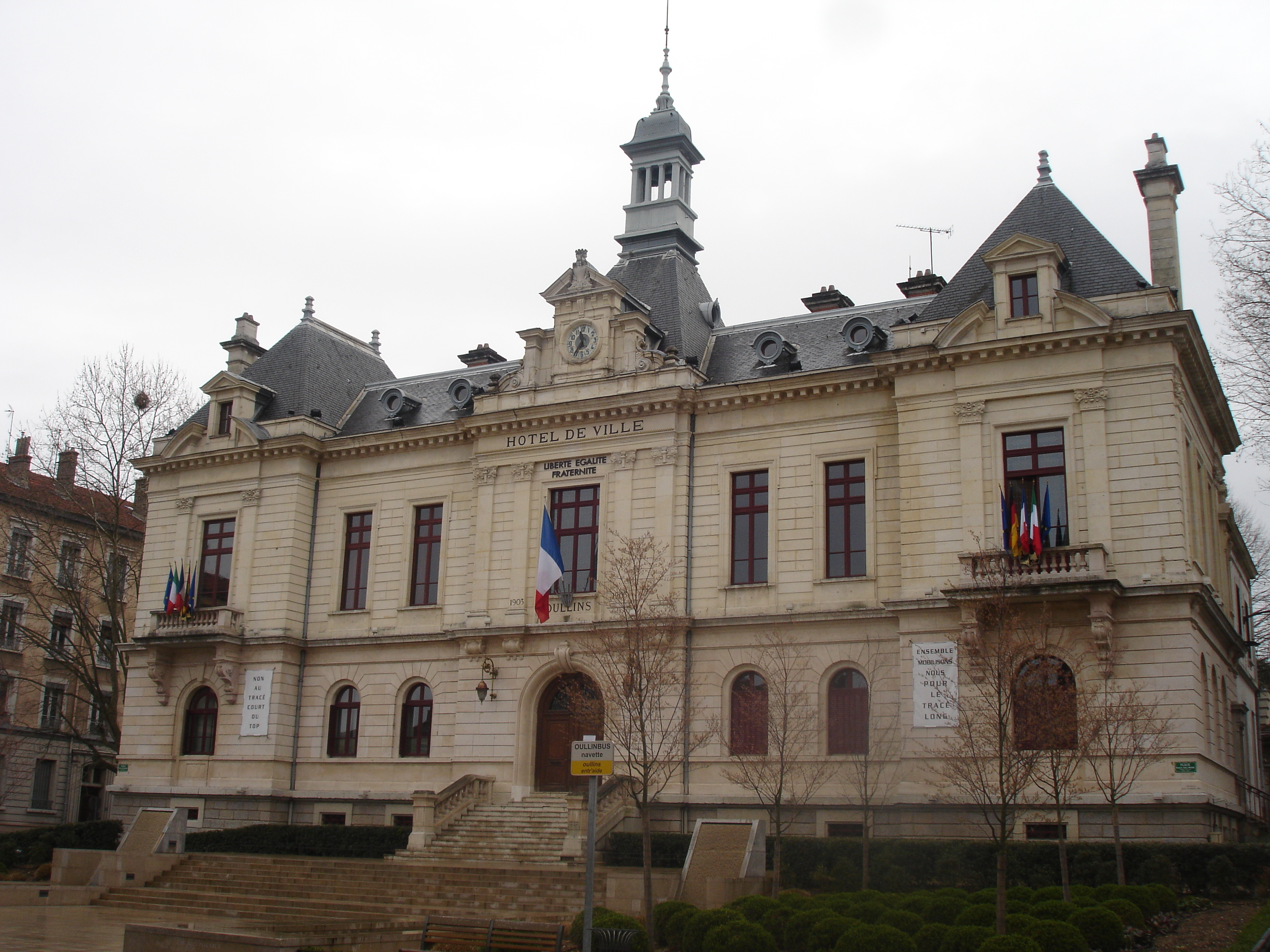 Oullins (69) : La mairie